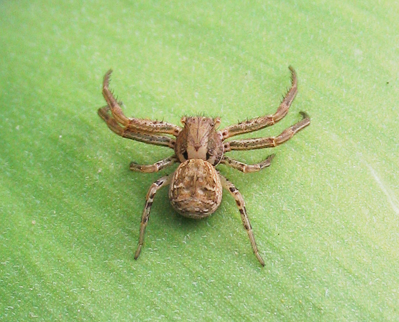 Beschreibung: Krabbenspinne / Gattung: Xysticus Fotograf: Darkone, 30. April 2005